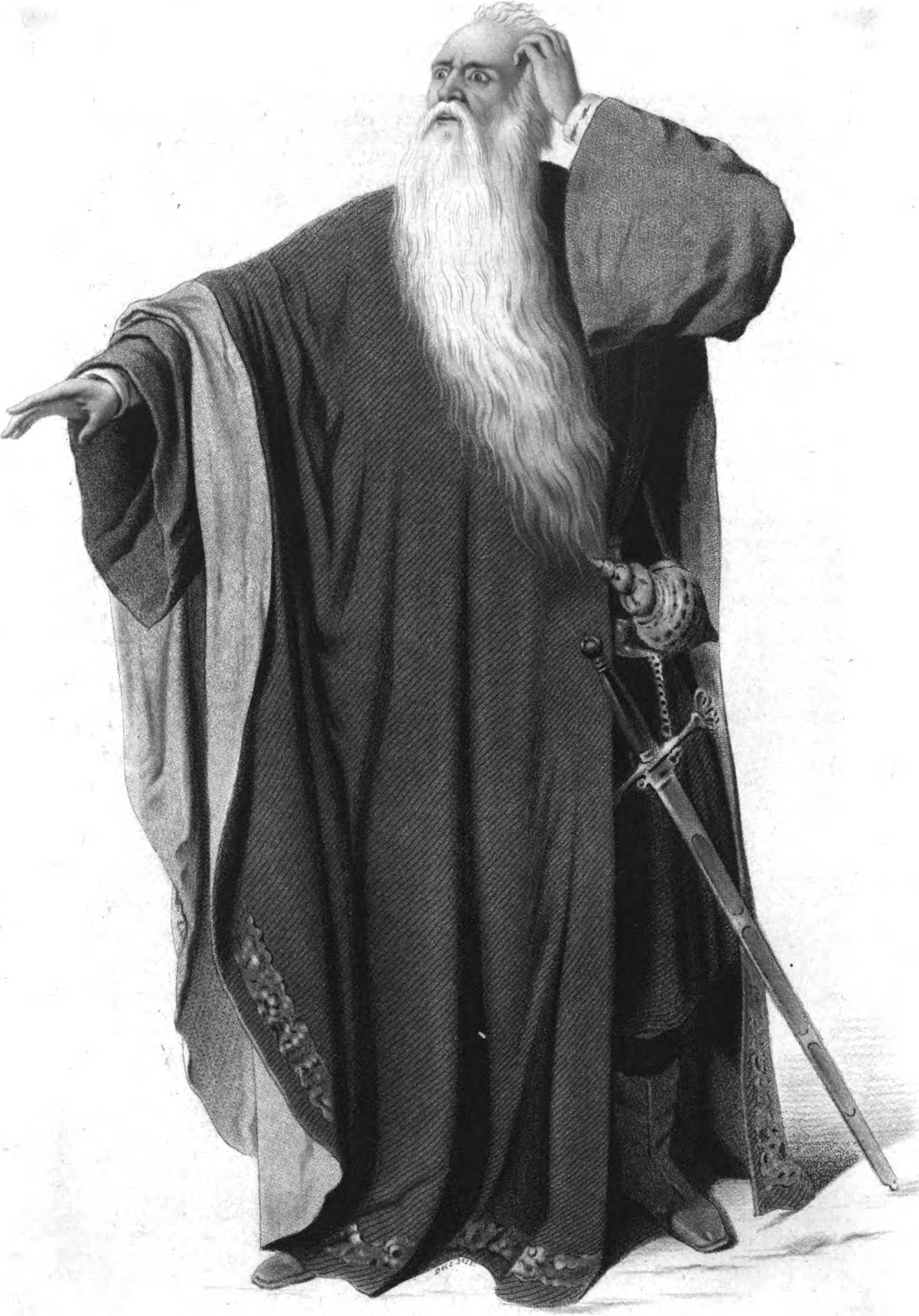 Karl Grunert, deutscher Schauspieler im 19. Jh., in der Rolle des Königs Lear.